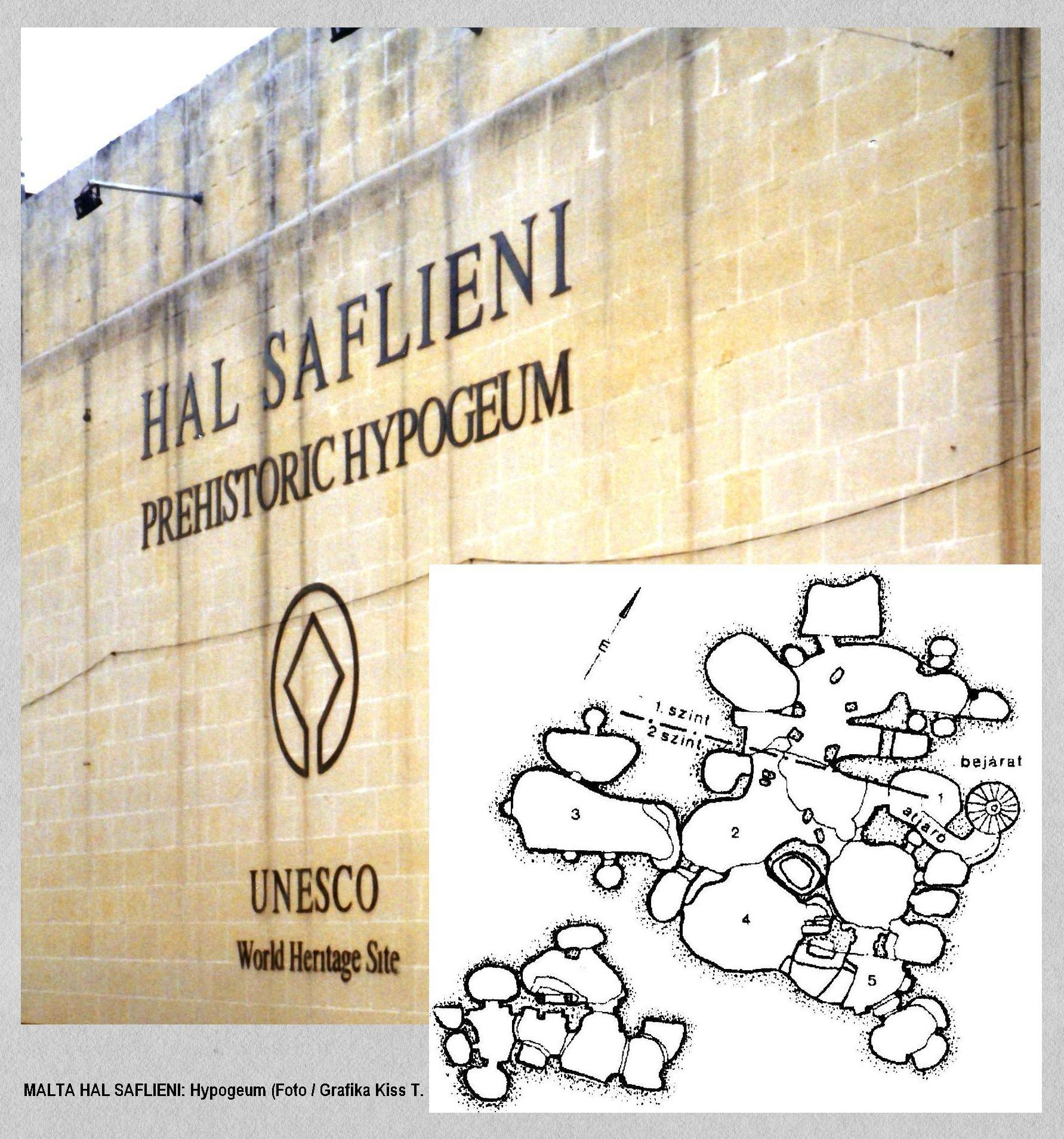 Hal Saflieni, Hypogeum, Málta (Világörökség)